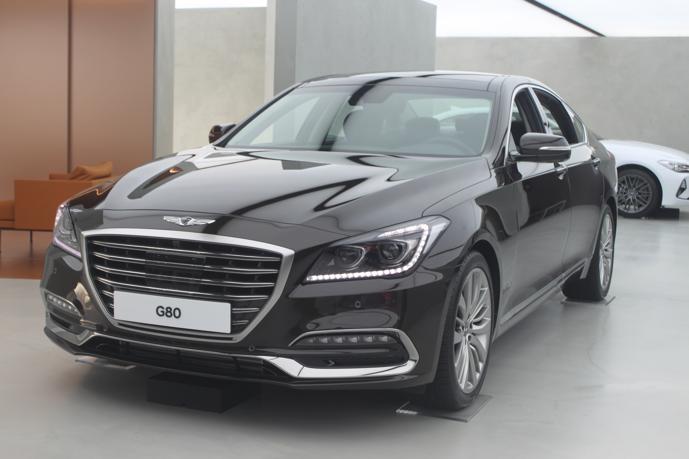 제네시스 G80(2.2ℓ 디젤) 정측면